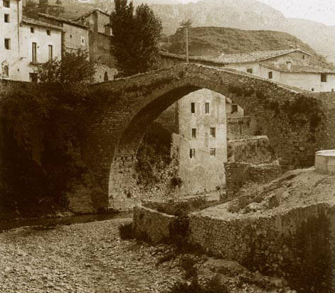 Pont Vell de La Pobla de Lillet. Rafael Degollada i Castanys (Entre 1912 i 1924)